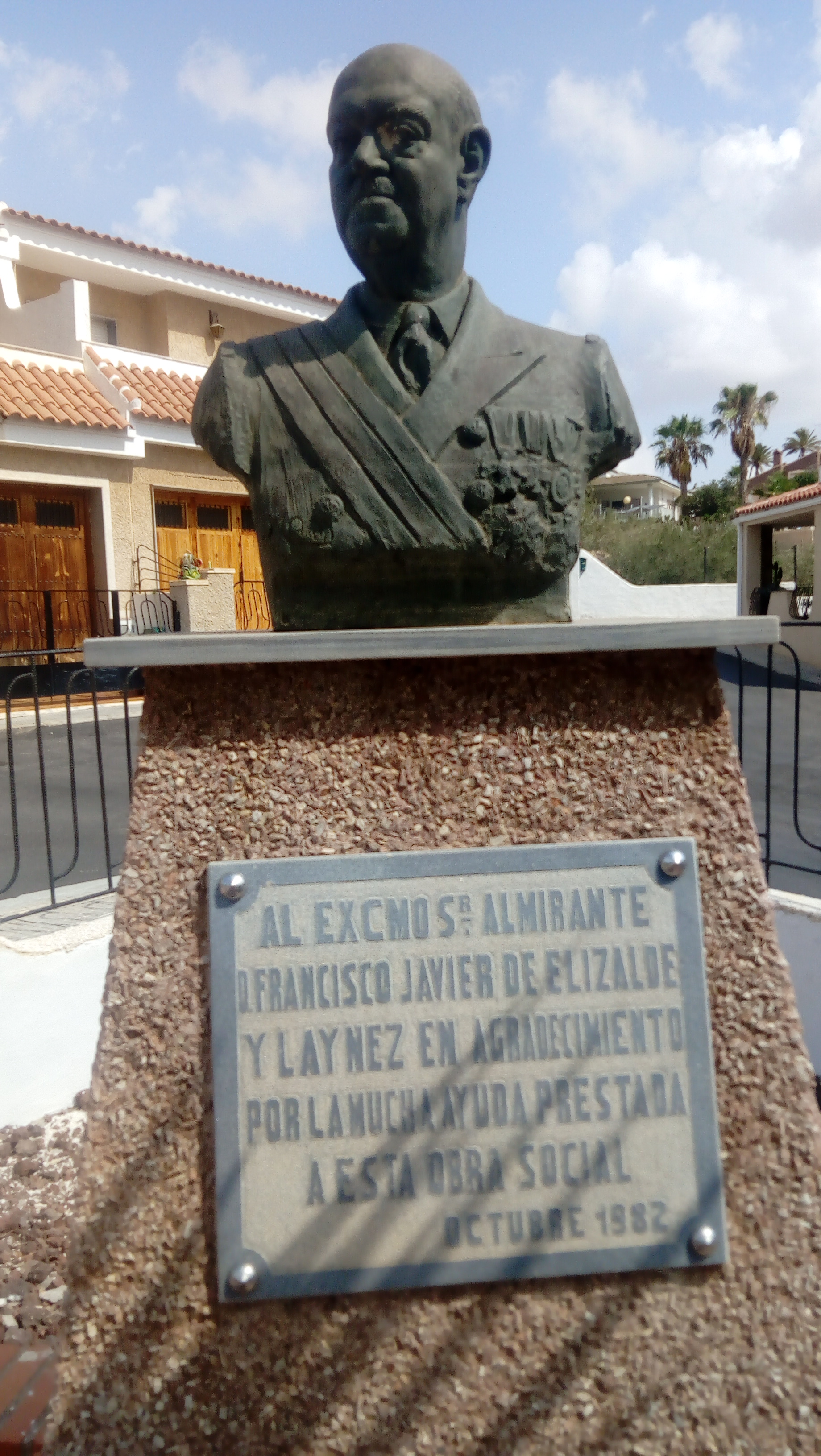 Está situado en la Cooperativa Asdrúbal de Canteras (Cartagena)